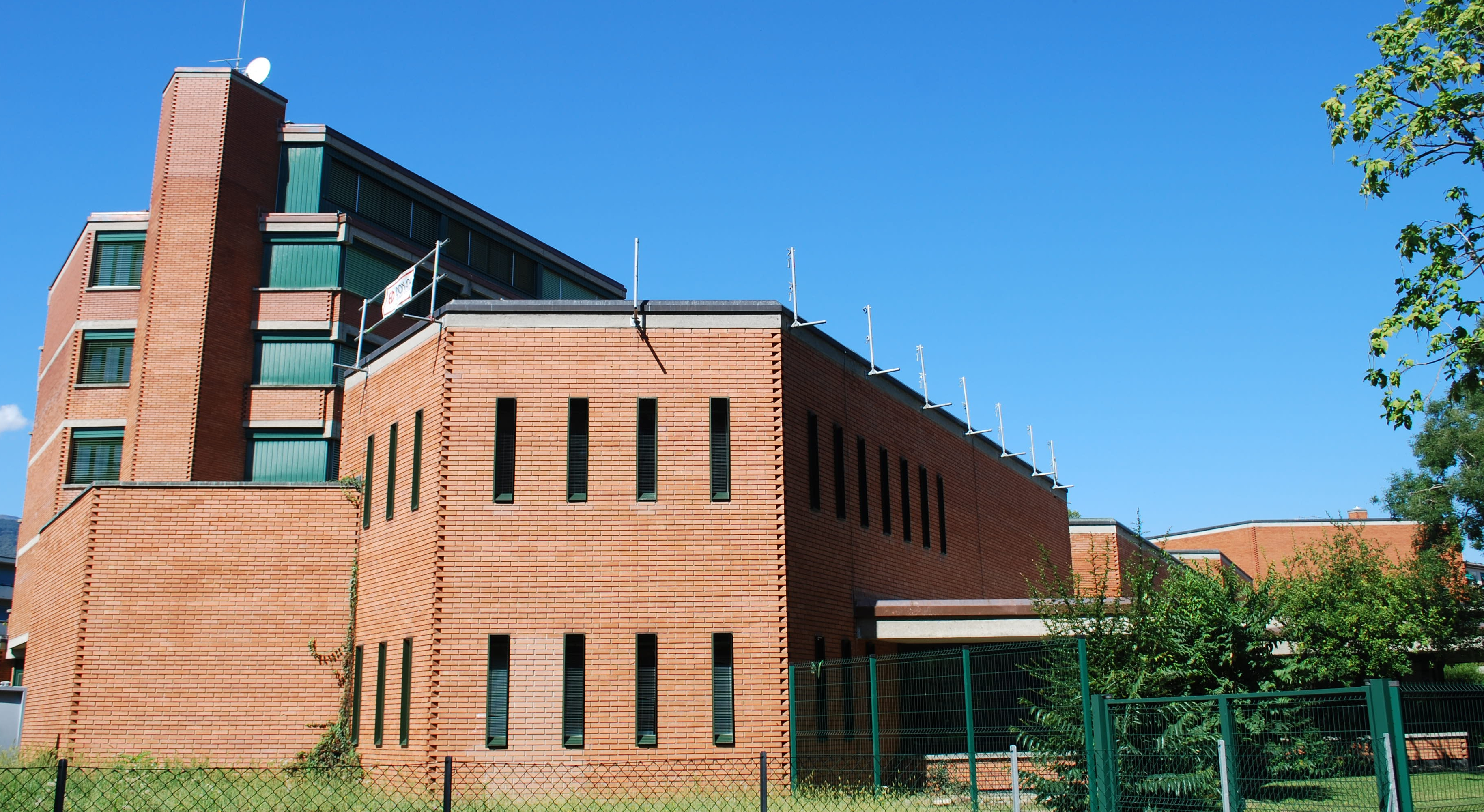 Studio radio Rsi, Facciata del complesso ovest